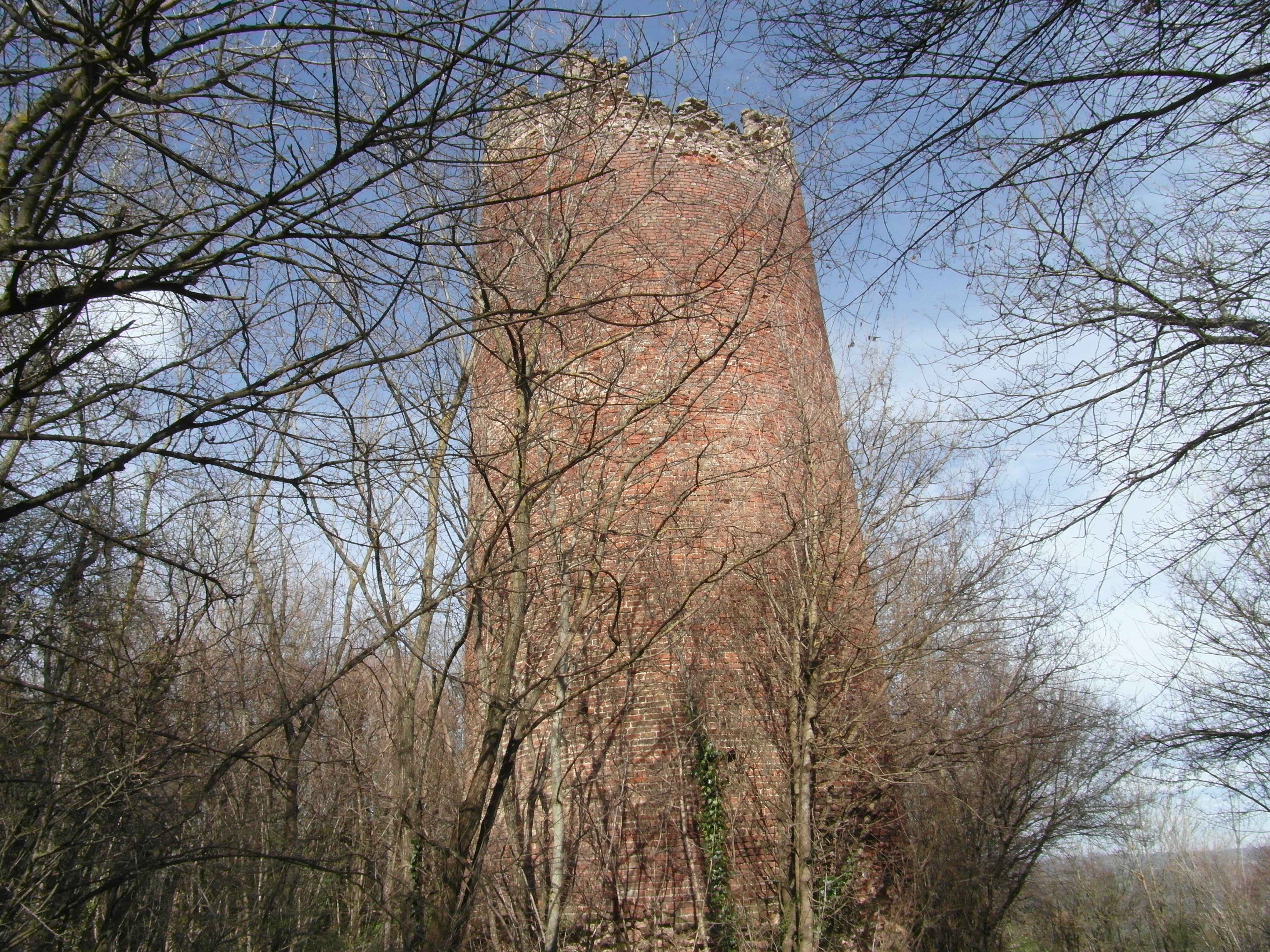 La tour de Pinet en mars 2019